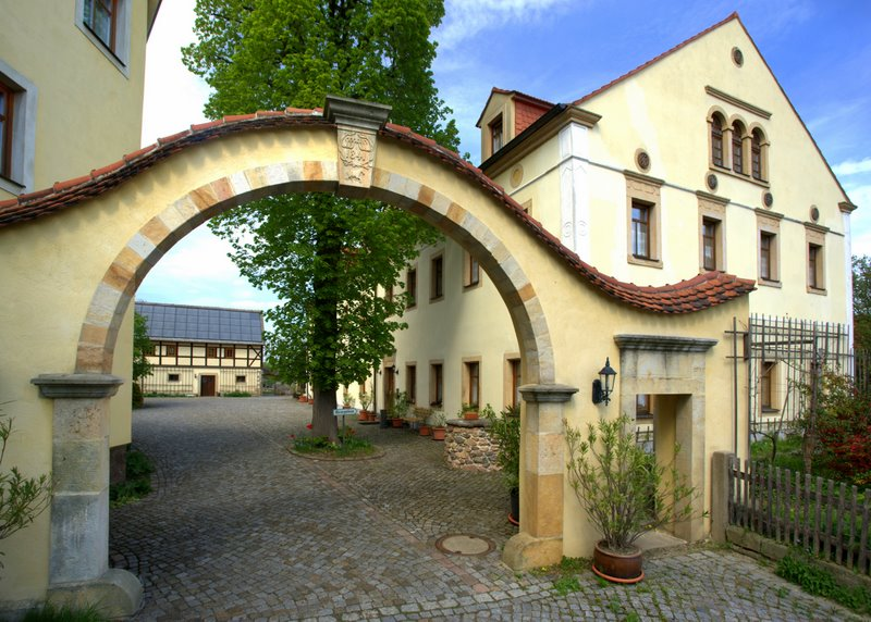 Torbogen über der Zufahrt zum Gut Wildberg einem denkmalgeschützten Vierseithof, Gutsweg 8, OT Wildberg, Gemeinde Klipphausen